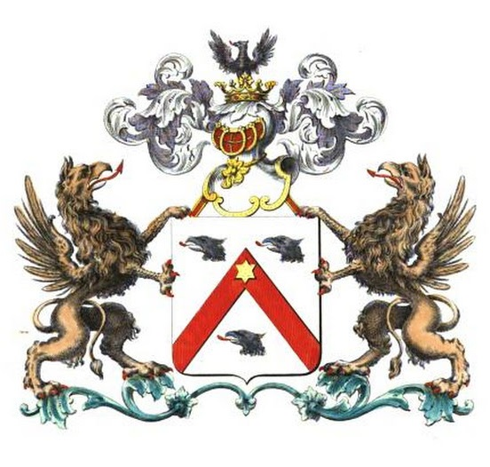 Wapenschild Huis